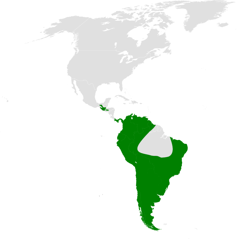 Notiochelidon distribution map